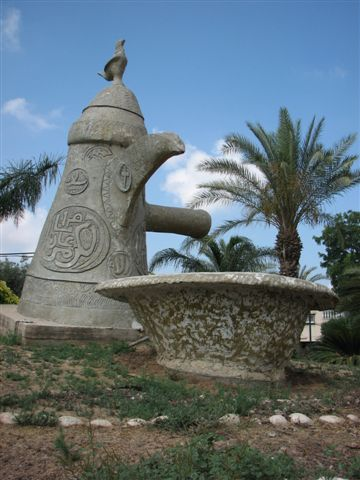 הכניסה ליישוב he:ג'דיידה-מכר